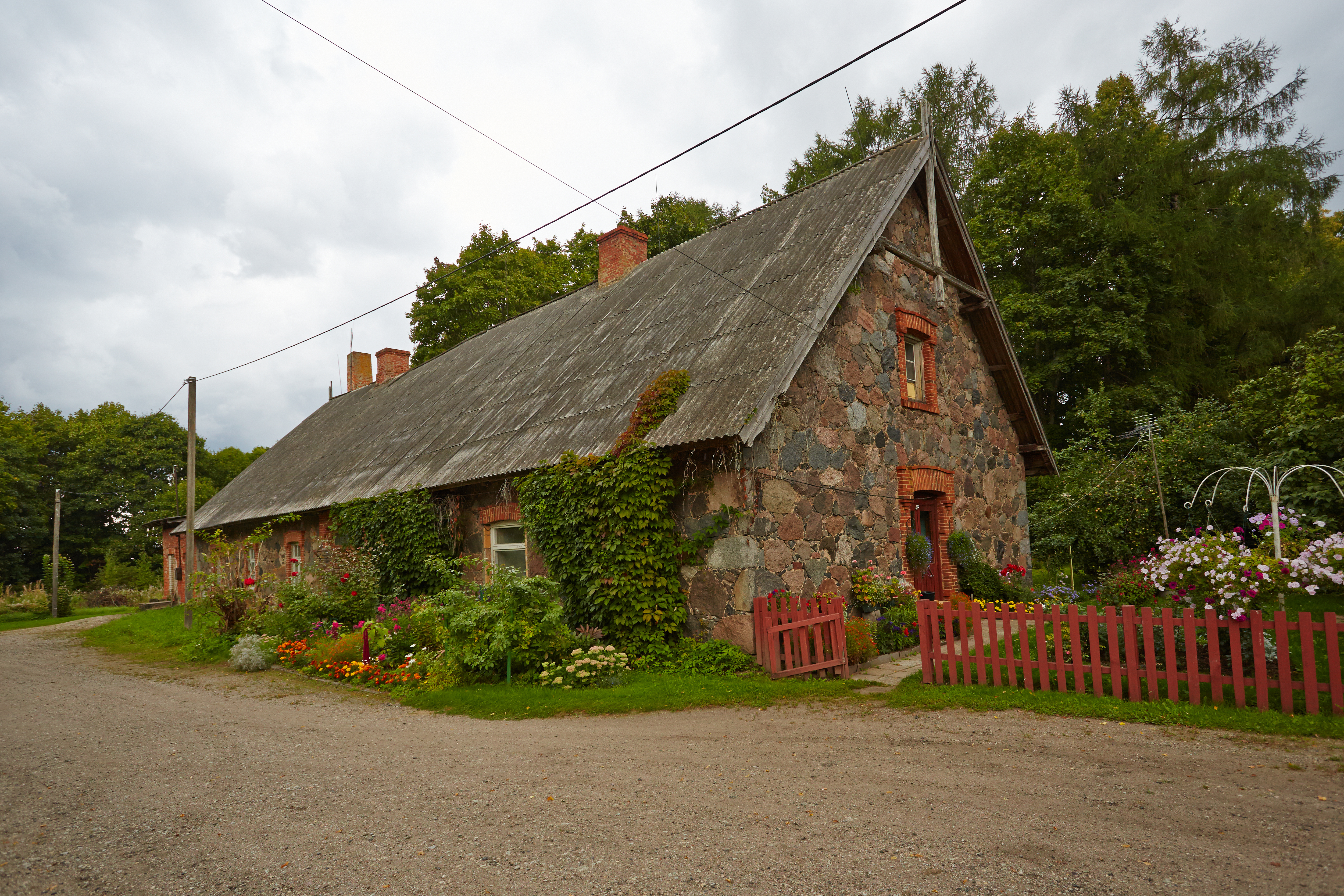 Tilsi mõisa meierei 2013. aasta augustis.